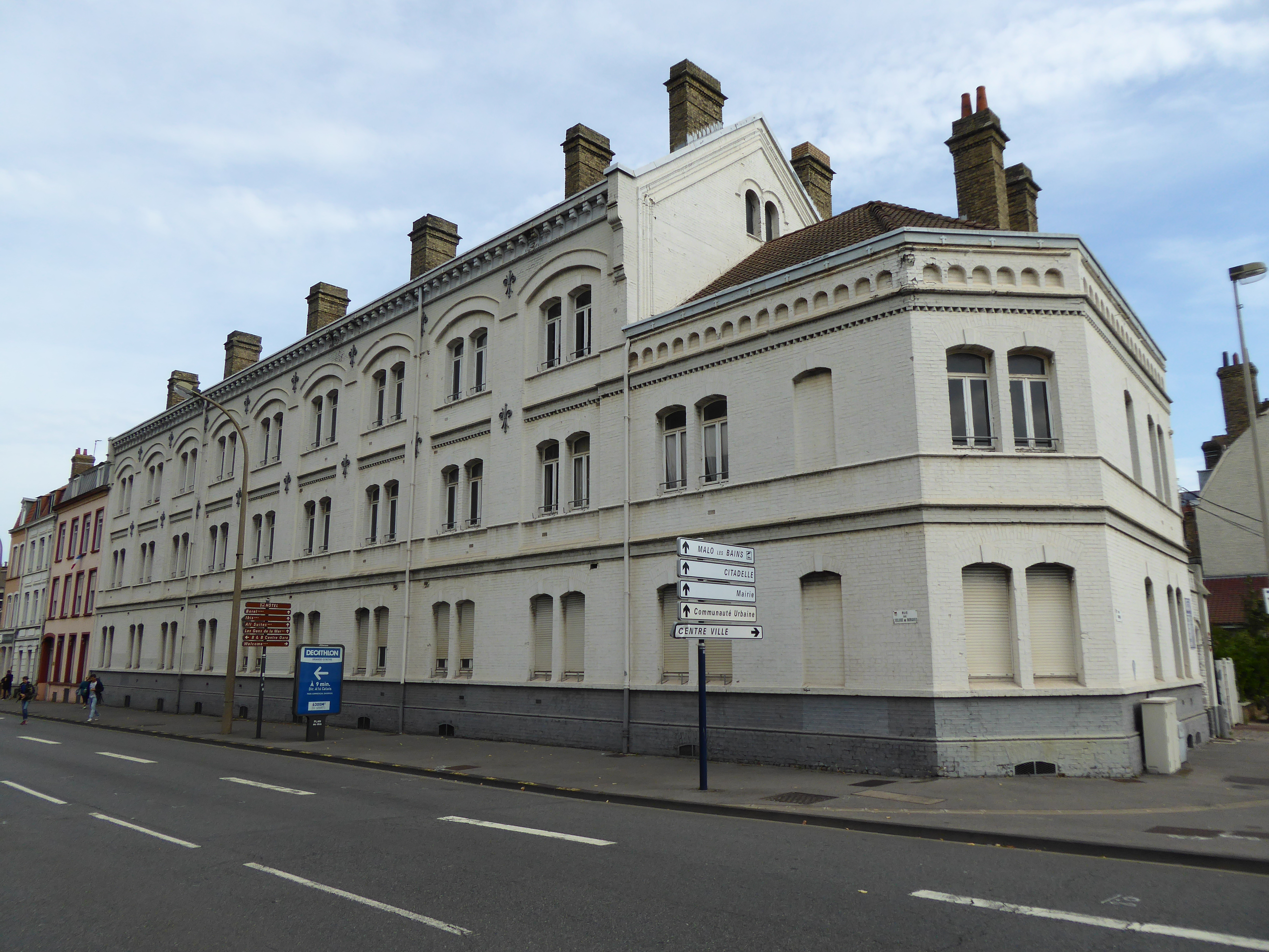 Caserne de gendarmes édifiée vers 1895 par l'architecte pierre Julien Adolphe van Moe, elle n'apparaît pas sur le cadastre de 1888 ; en 1968, elle est transformée en foyer de personnes âgées, puis en logements sociaux